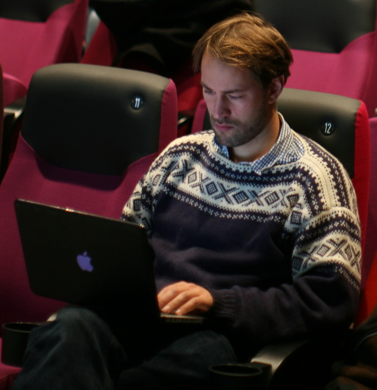 Tristram Stuart er en verdenskjent mataktivist, og han jobber for at vi skal kaste mindre mat. Her besøker han et Framtiden i våre hender-arrangement i Haugesund.